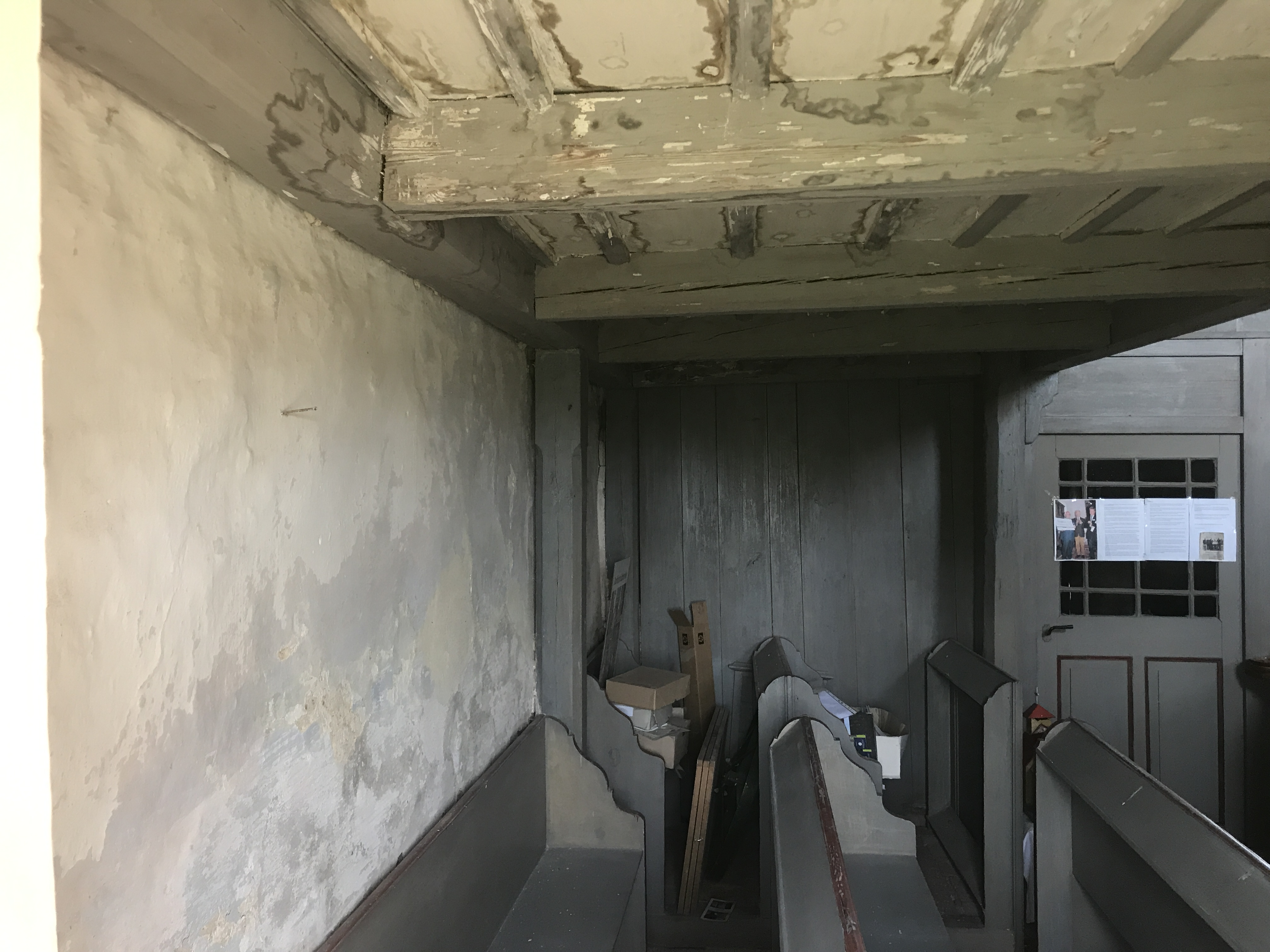 Die evangelische Dorfkirche Lichterfelde ist eine Feldsteinkirche aus dem 13. Jahrhundert in Lichterfelde, einem Ortsteil der Gemeinde Niederer Fläming im Landkreis Teltow-Fläming im Land Brandenburg.